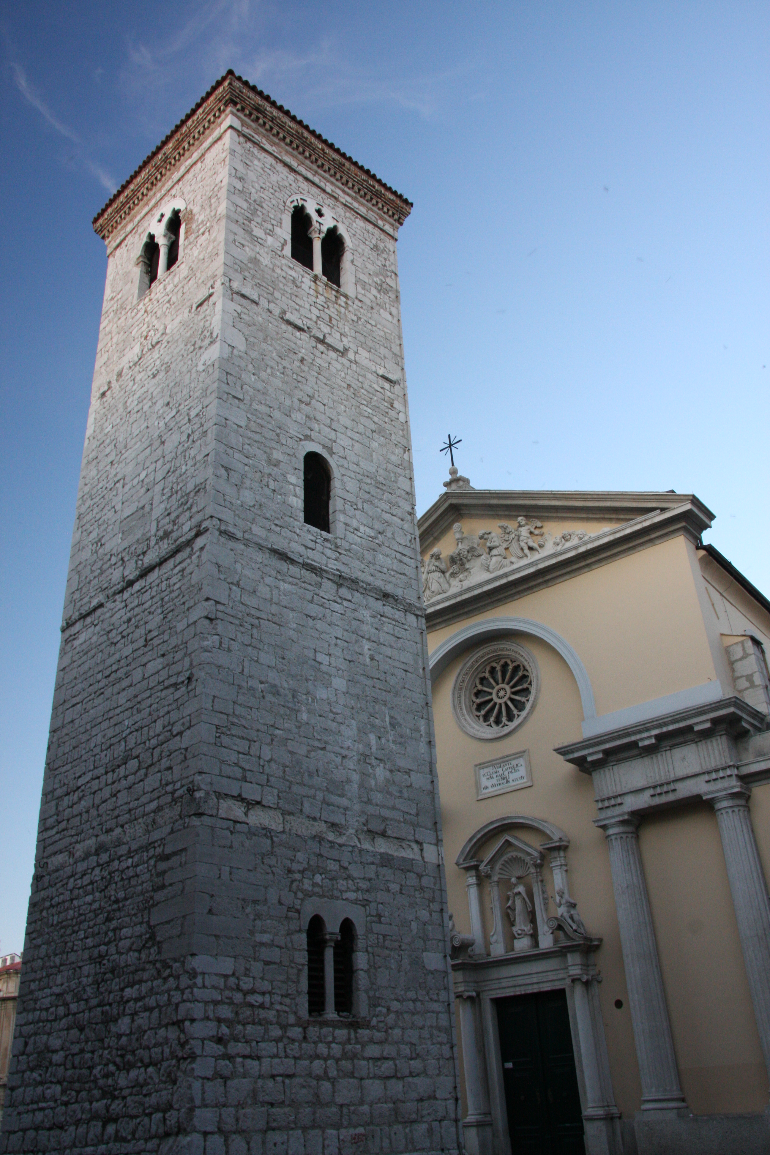 Church at Dusk - Rijeka, Croatia 2011